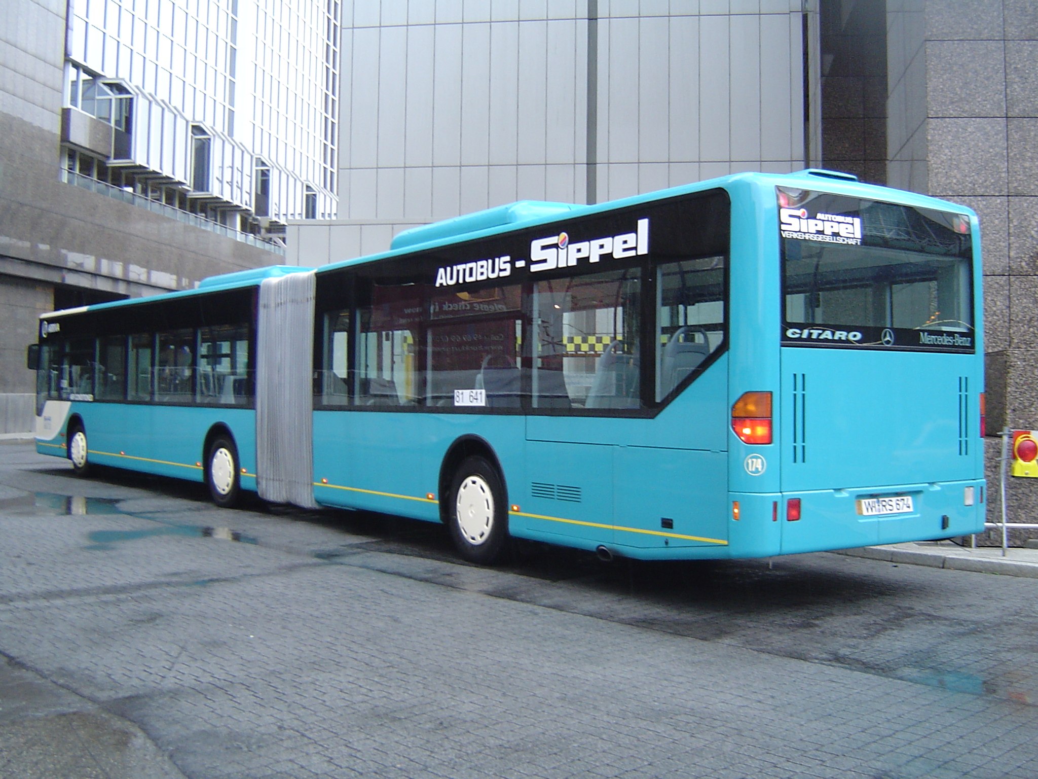 In Arriva-Farben umlackierter Sippel Citaro G